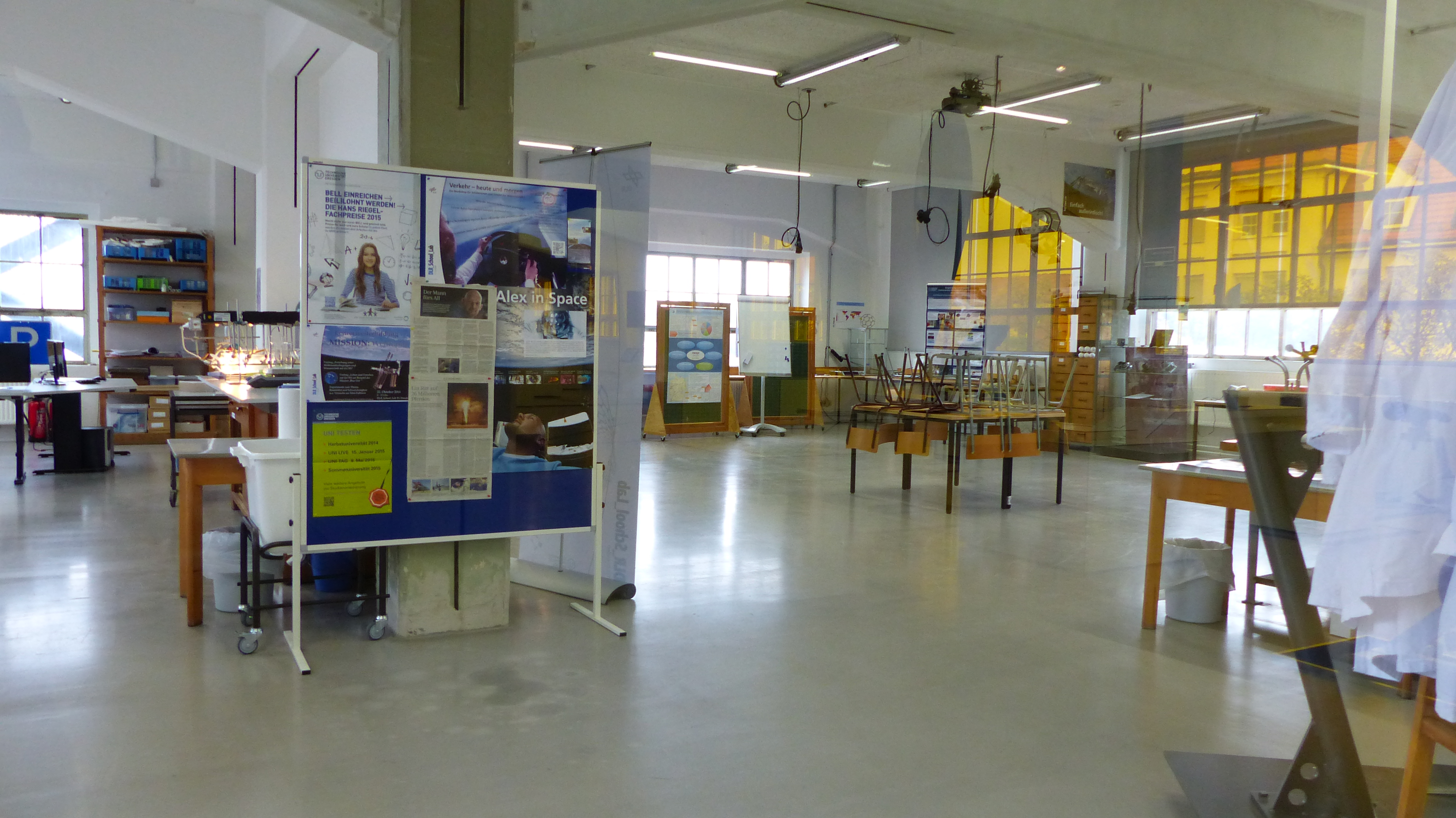 DLR School Lab Dresden, in den Technischen Sammlungen Dresden